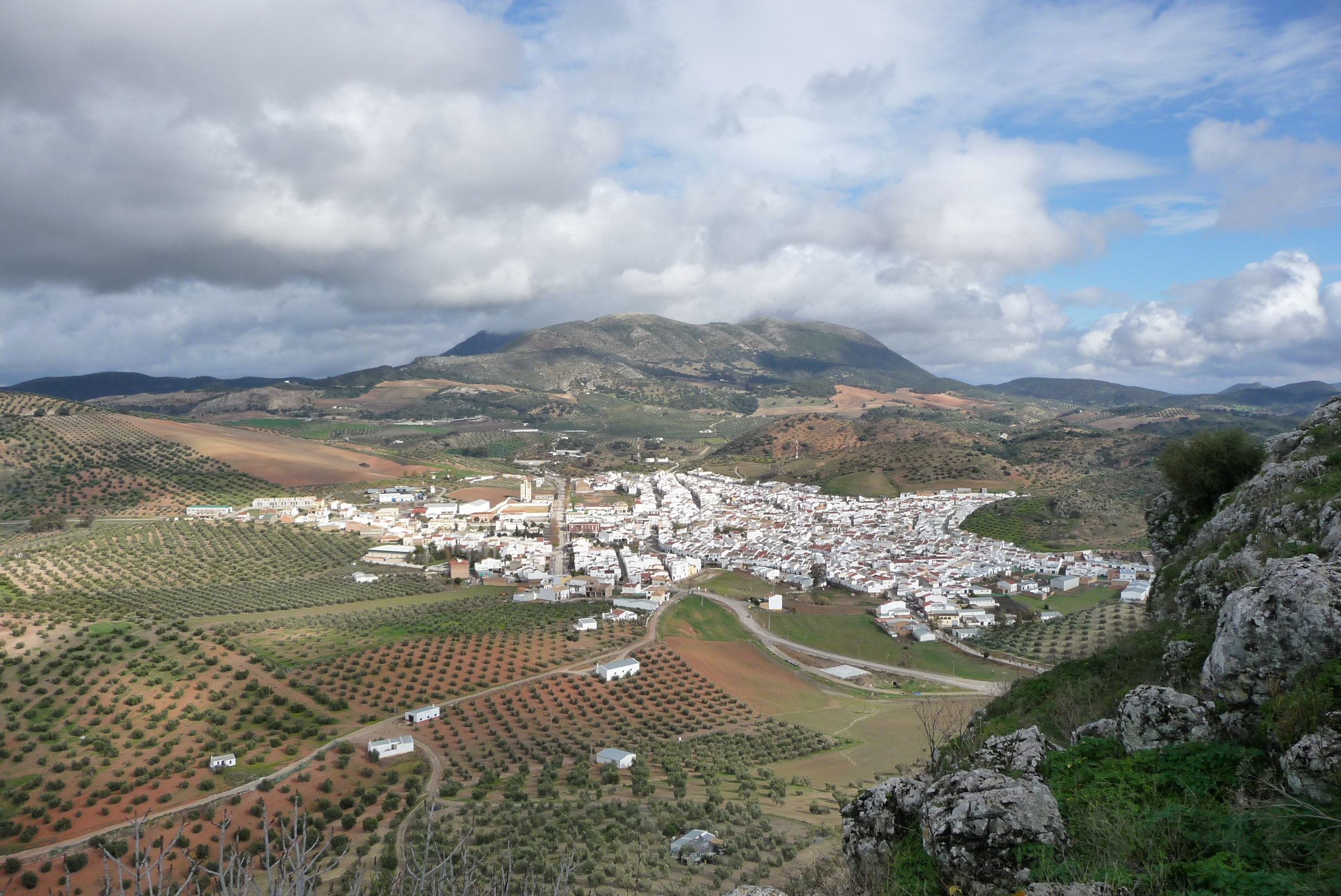 Pruna (Andalusia, Spain).